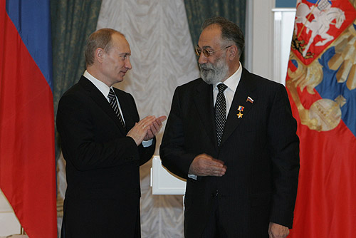 МОСКВА, КРЕМЛЬ. Вручение государственных наград. Звание Героя России присвоено руководителю высокоширотной арктической глубоководной экспедиции «Арктика-2007» Артуру Чилингарову.